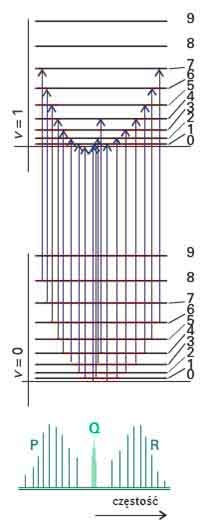 poziomy energetyczne